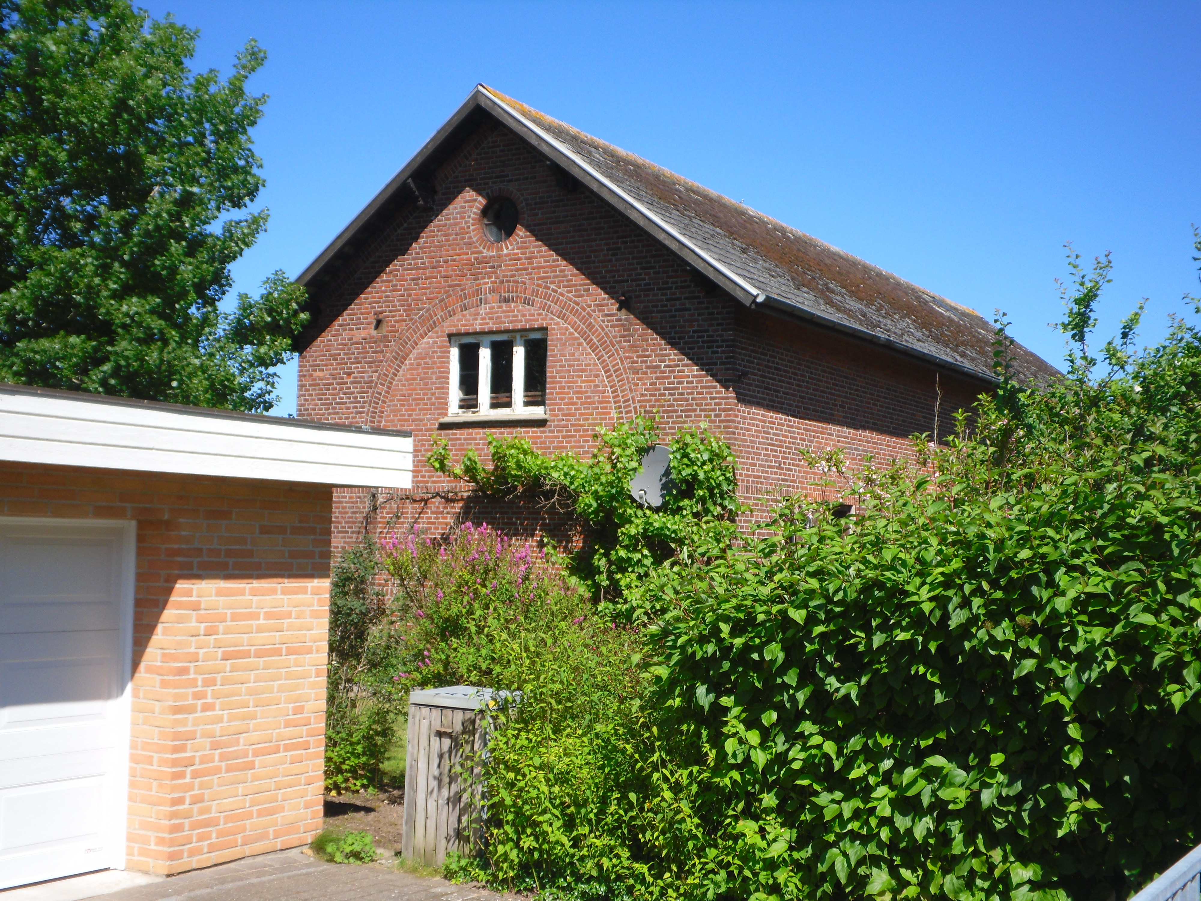 Hejlsminde Remise, Banedæmningen 19